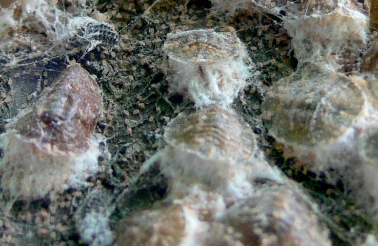 Cochenilles femelles (hémiptères parasite des végétaux du sous-ordre des Sternorhynques), sur tilleul, en bordure de canal de la Deûle, à Lambersart, dans le nord de la France